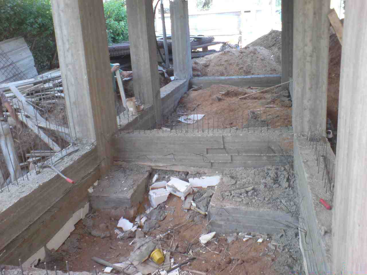 עיבוי עמודים